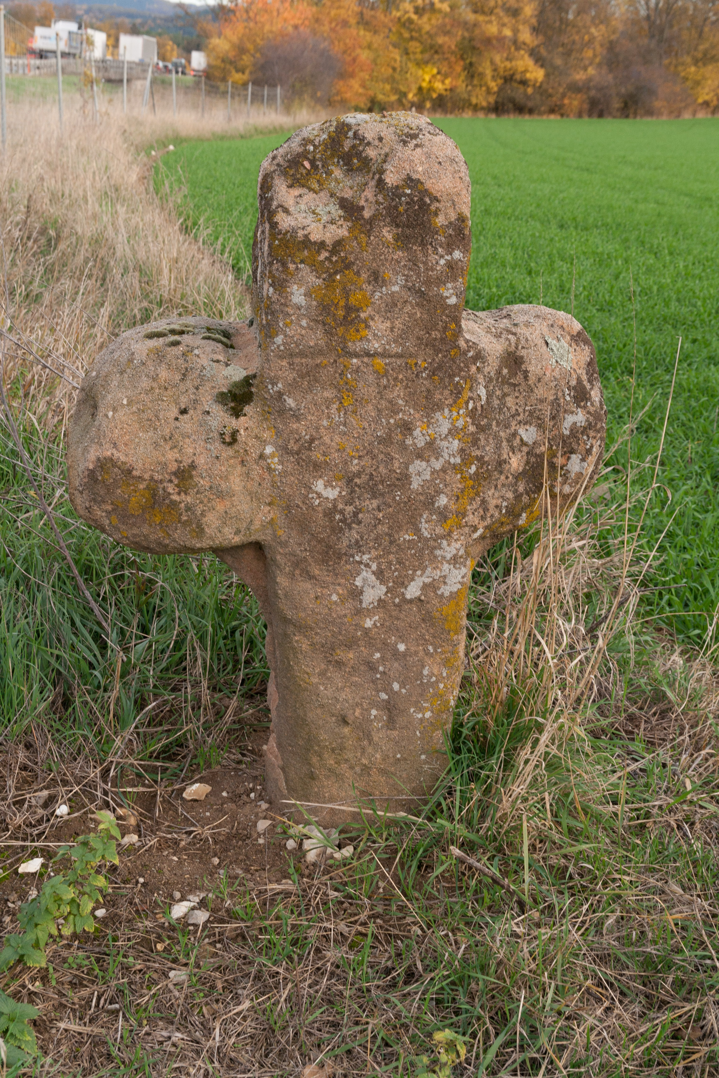 Steinkreuz, Sühnekreuz, Altdorf bei Nürnberg, Rasch, Sicht von Osten nach Westen